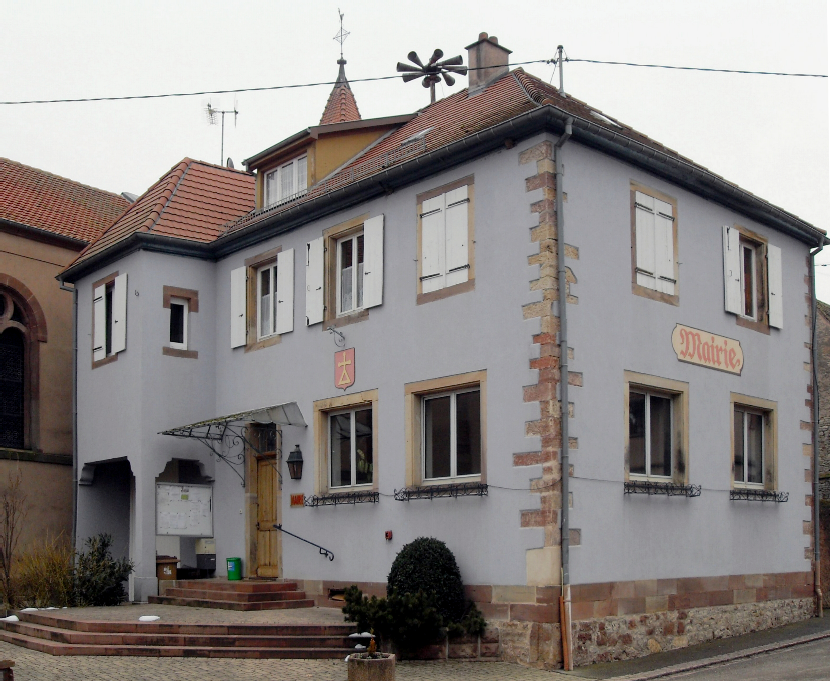 La mairie à Crastatt